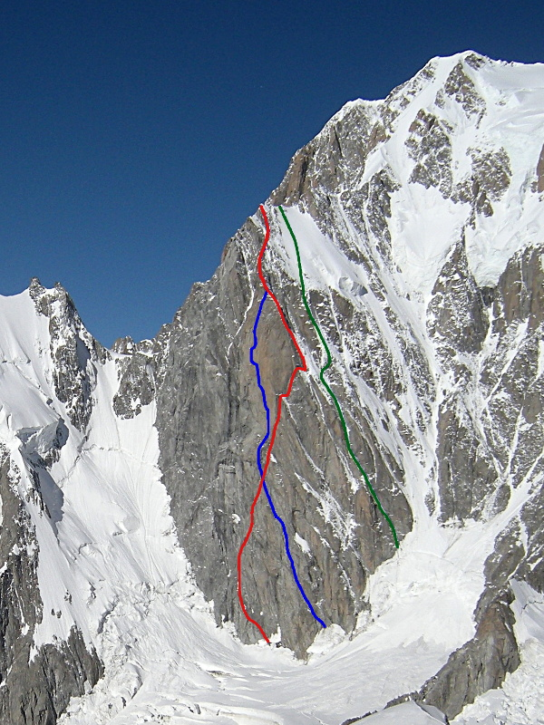 Le Grand Pilier d'Angle et le mont Blanc de Courmayeur depuis le sommet de la Tour Ronde avec : - en rouge la voie Bonatti-Gobbi (1-3 août 1957) - en bleu la voie Divine Providence (Gabarrou et Marsigny, 5-8 août 1984) - en vert la voie Cecchinel-Nominé (16-17 septembre 1971)